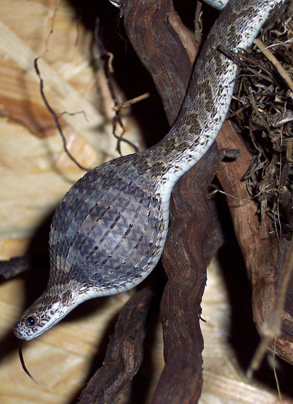 Eierschlange frisst Zwergwachtelei